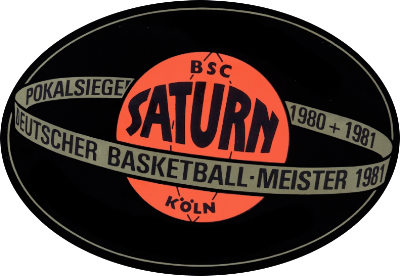 Aufkleber des BSC Saturn, Köln